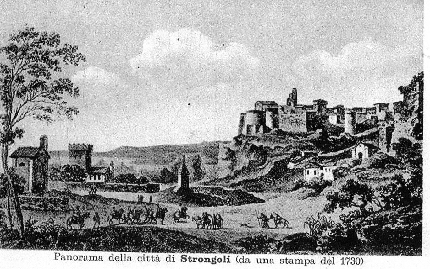 Veduta di Strongoli (Crotone) nel 1730